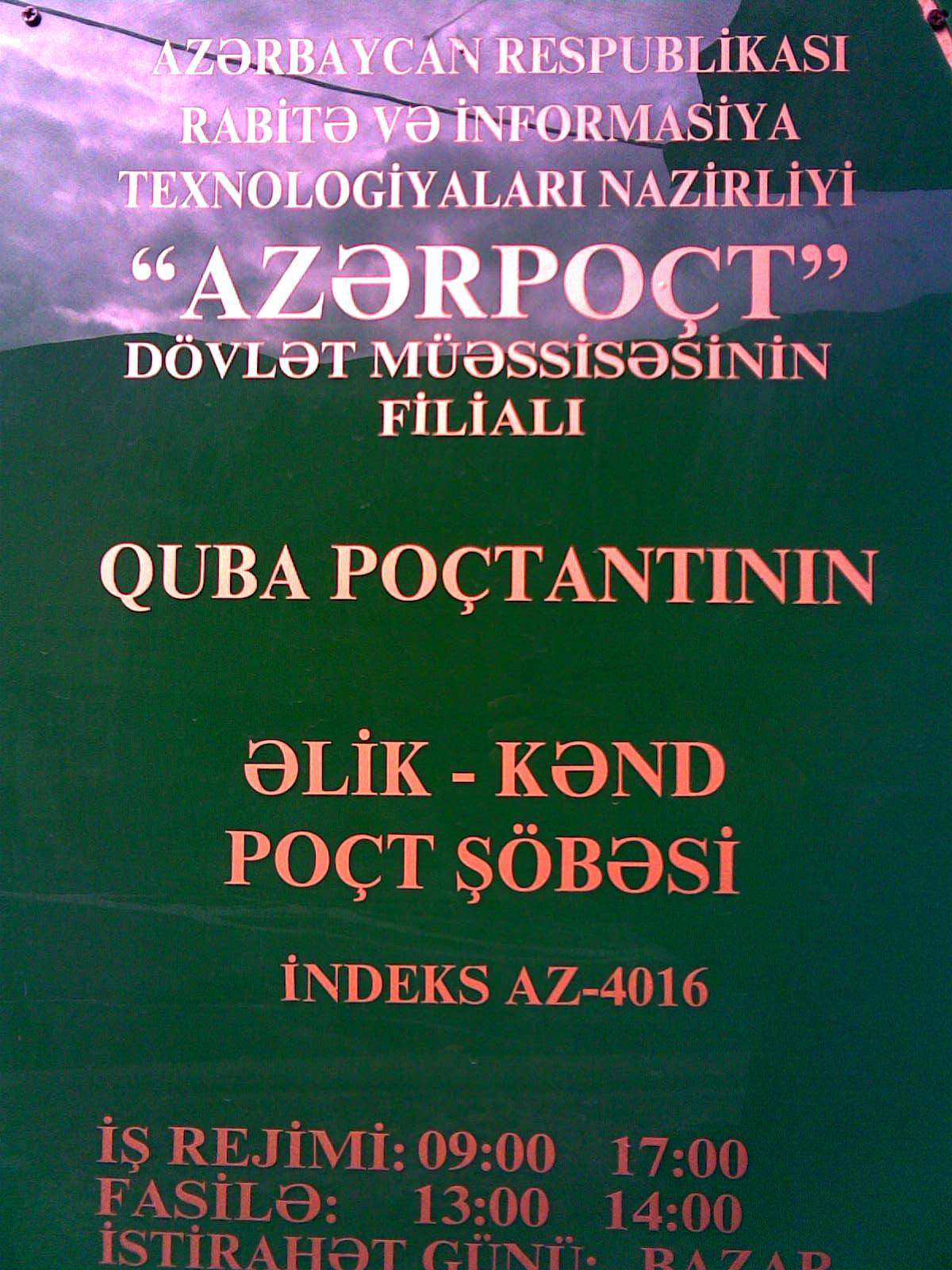 Əlik kənd poçt şöbəsi, Quba, Azərbaycan